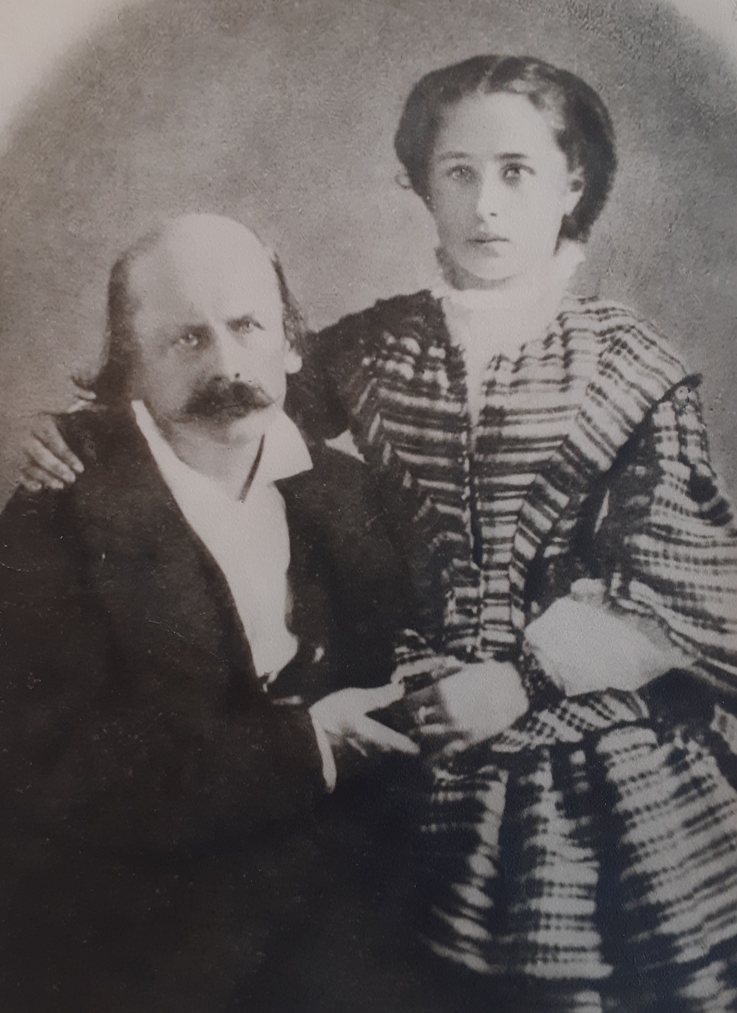 Vincenz Weber mit einer seiner Töchter Familienbesitz